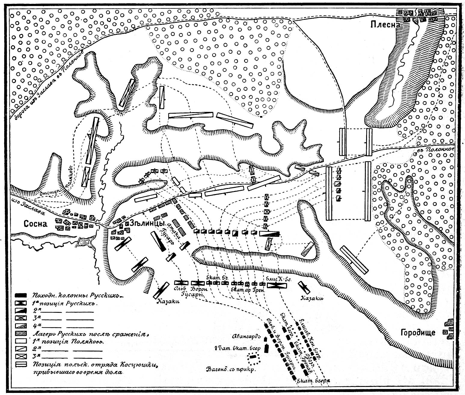 Это изображение было использовано для иллюстрирования статьи «Зелинцы» опубликованной в десятом томе «Военной энциклопедии», который был издан книгоиздательским товариществом И. Д. Сытина в 1912—1913 гг. в столице Российской империи городе Санкт-Петербурге.